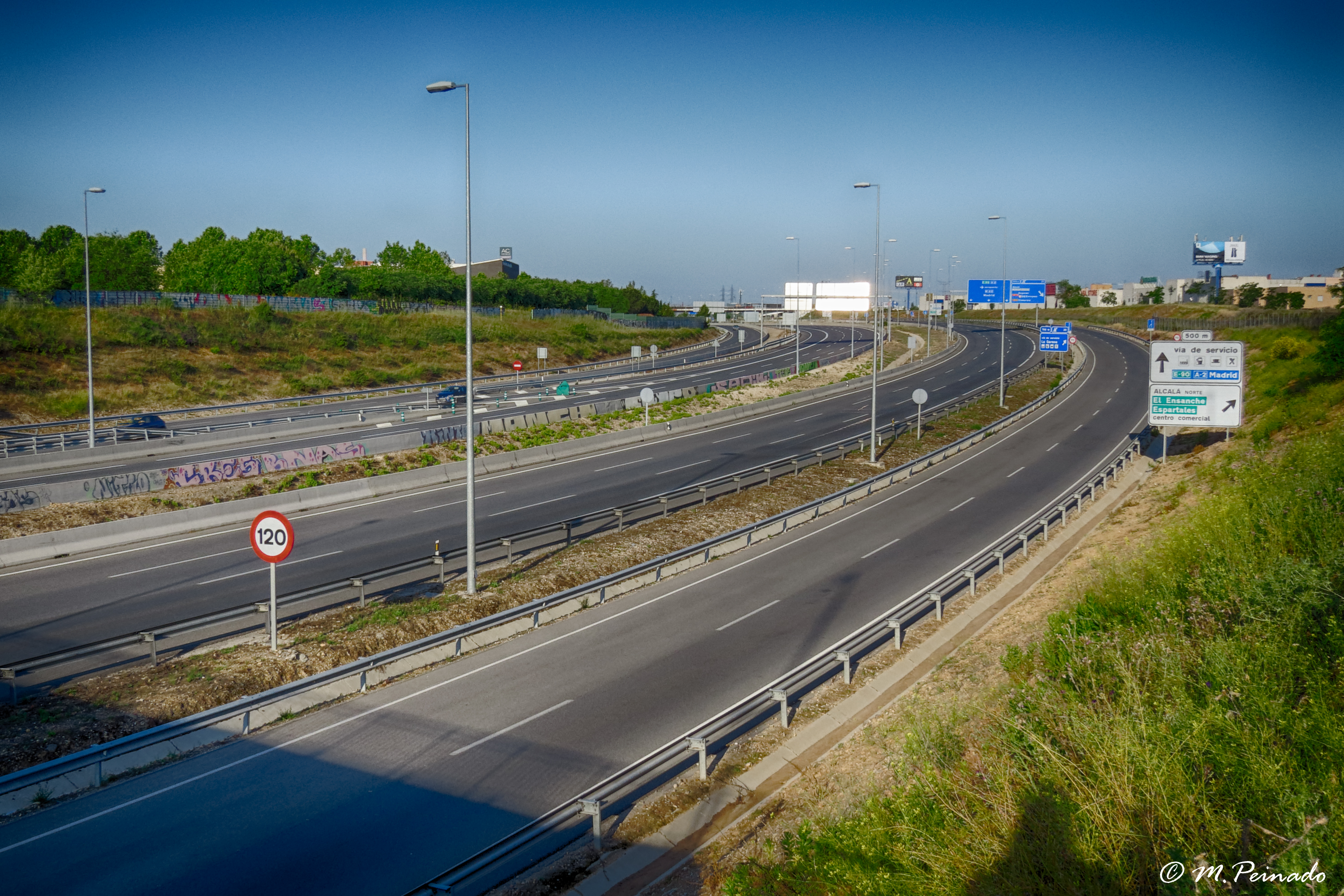 Autovía A2Alcalá de HenaresComunidad de MadridEspaña